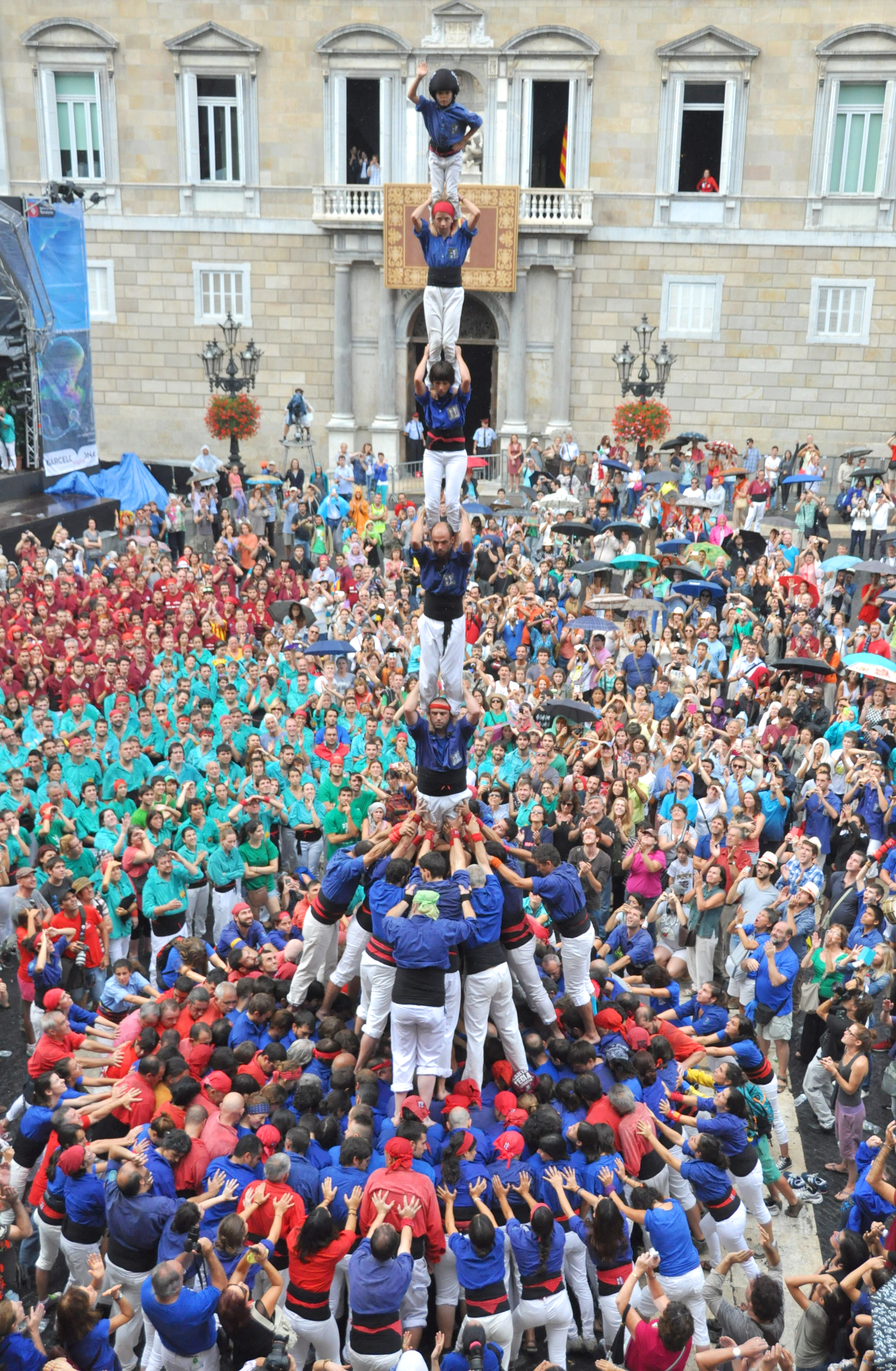 Pilar de 7 amb folre dels Castellers de la Vila de Gràcia durant la Mercè del 2014.